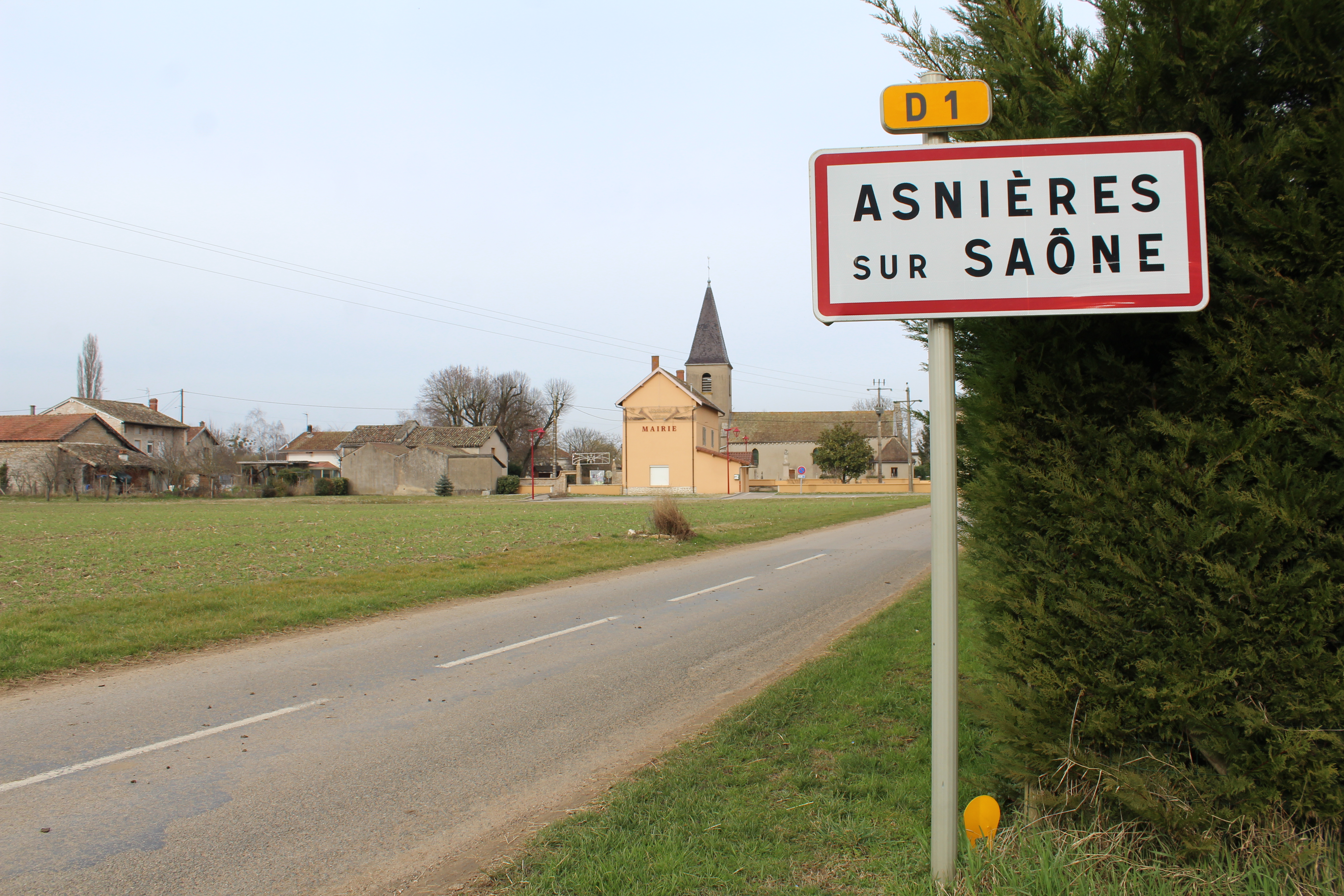 Panneau d'entrée dans Asnières-sur-Saône.